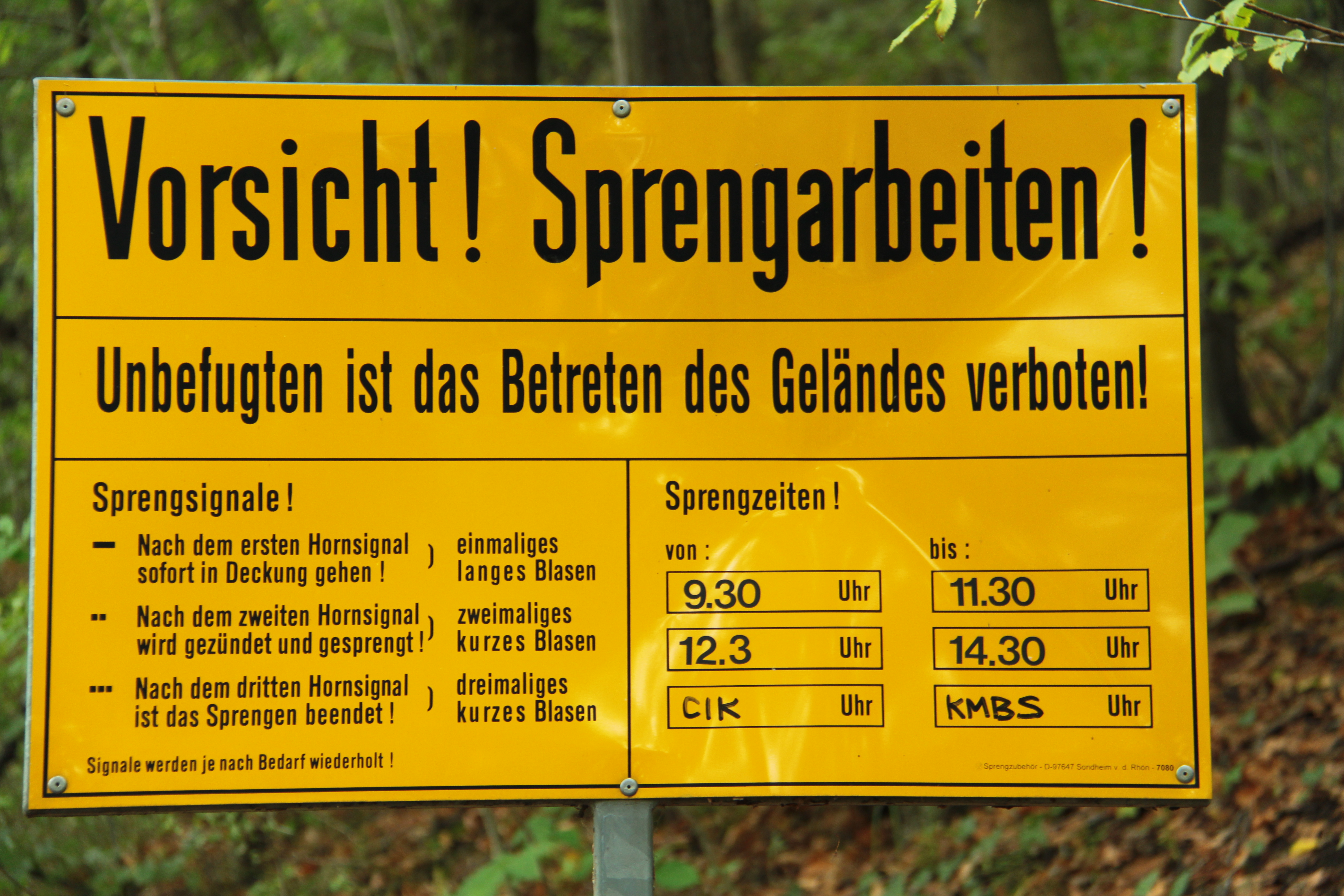 Impressionen Doberschau, Landkreis Bautzen, Sachsen